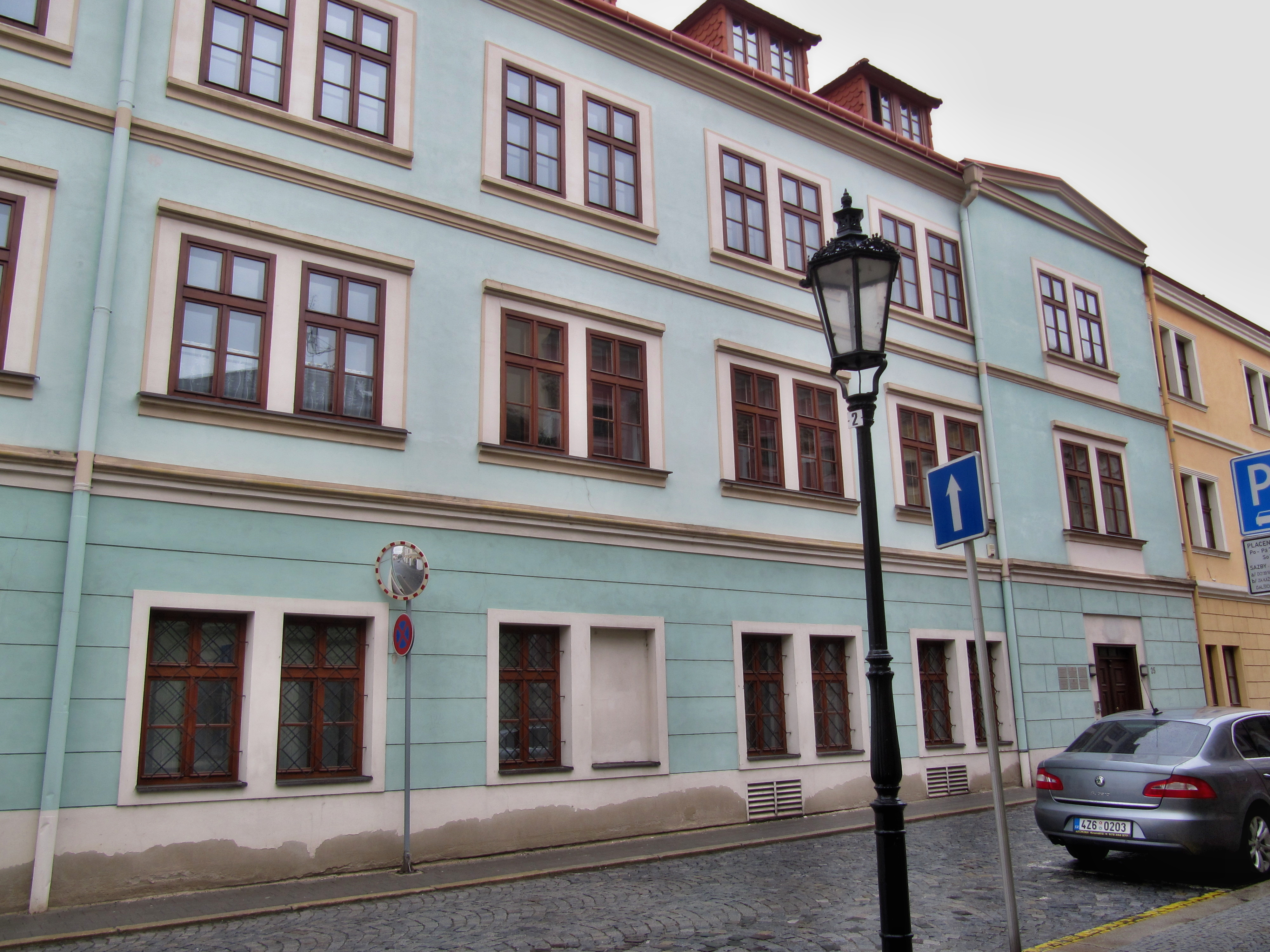 Měšťanský dům Řemenářovský (Kroměříž), Jánská 25/1, Kroměříž